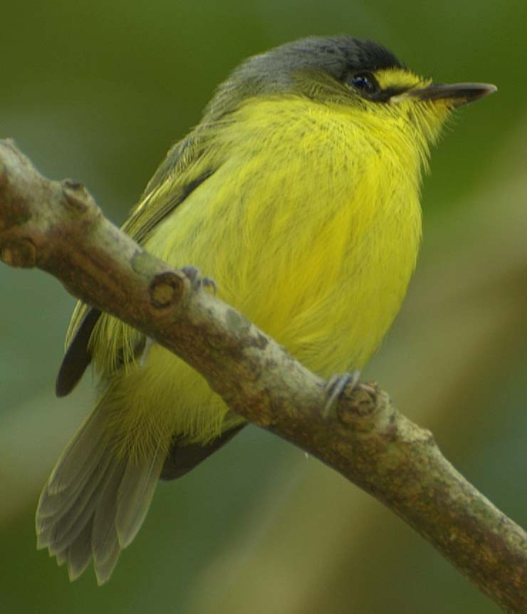 Todirostrum poliocephalum Margem do rio Ribeira de Iguape próximo à cidade de Registro